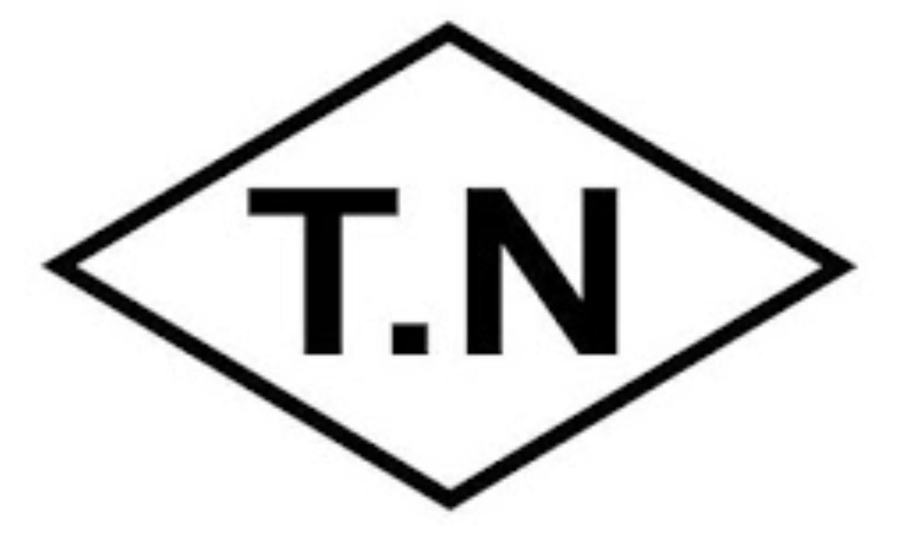 Nomura Logo